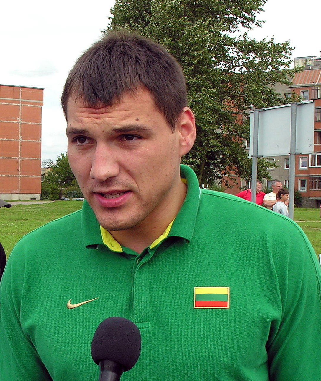 Jonas Mačiulis, Nacionalinės vyrų krepšinio rinktinės susitikimo Mažeikiuose metu 2009 m. liepos 31 d.